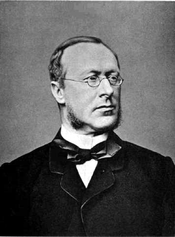 German vice-chancellor. Picture taken1875.